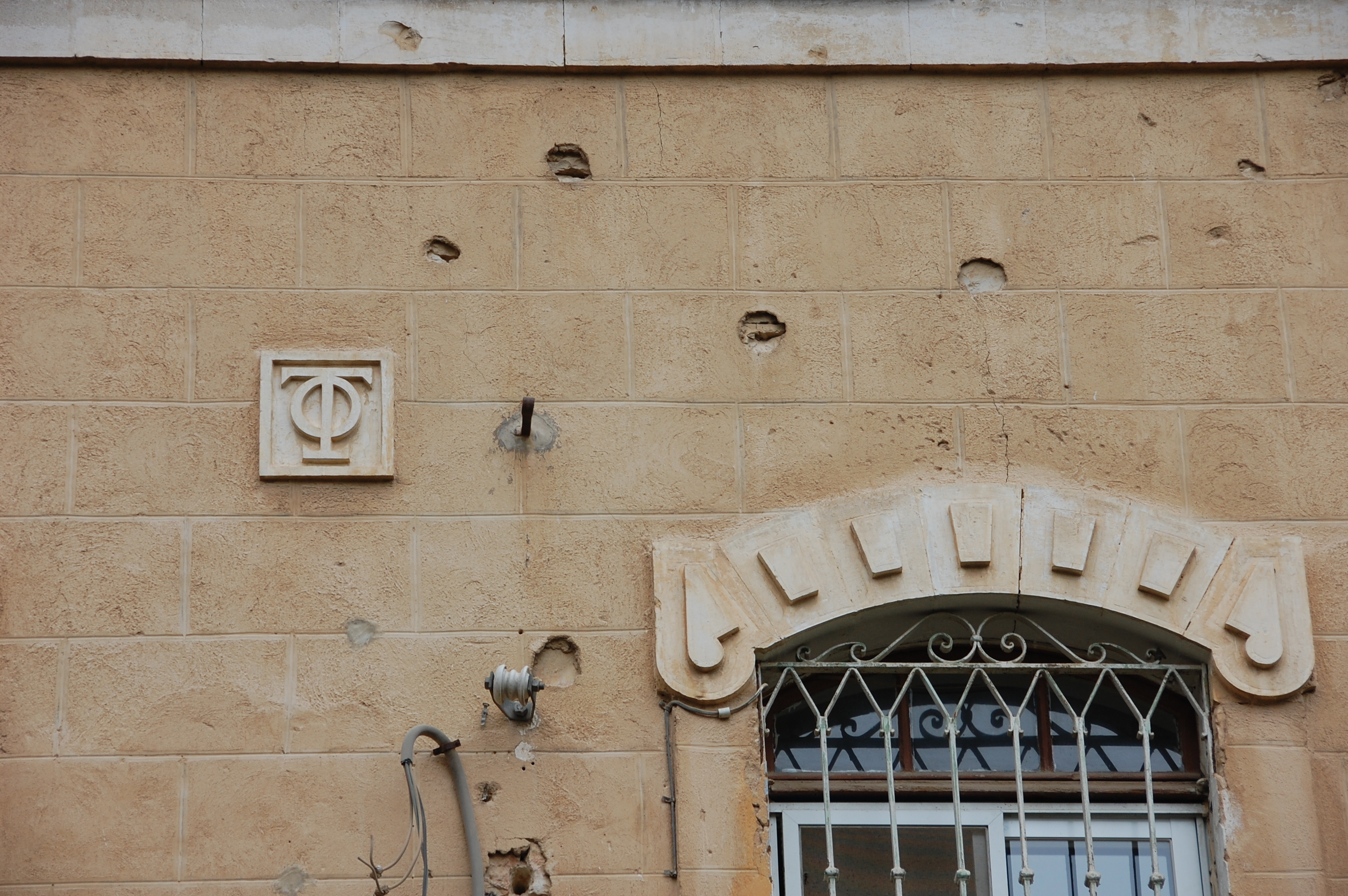 san simon in jerusalem